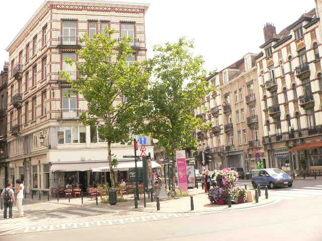 Moi E.Poulsen, cède tous les droit de cette photo à la fondation Wikimedia et Wikipedia-tous les droits sont entièrement libres.